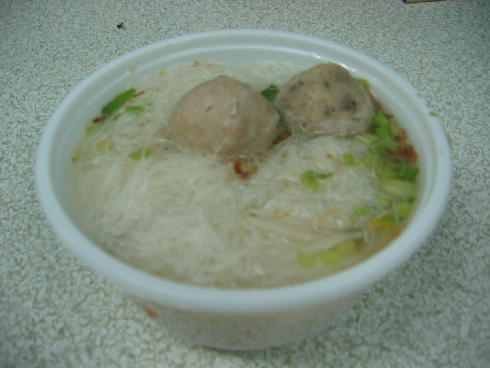 中文（台灣）: 新竹兩項特產：貢丸與米粉